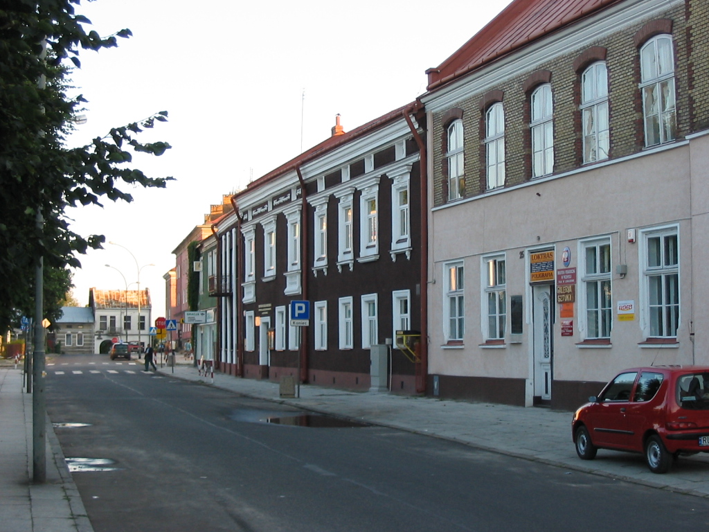 Szkoła Muzyczna w Lubaczowie